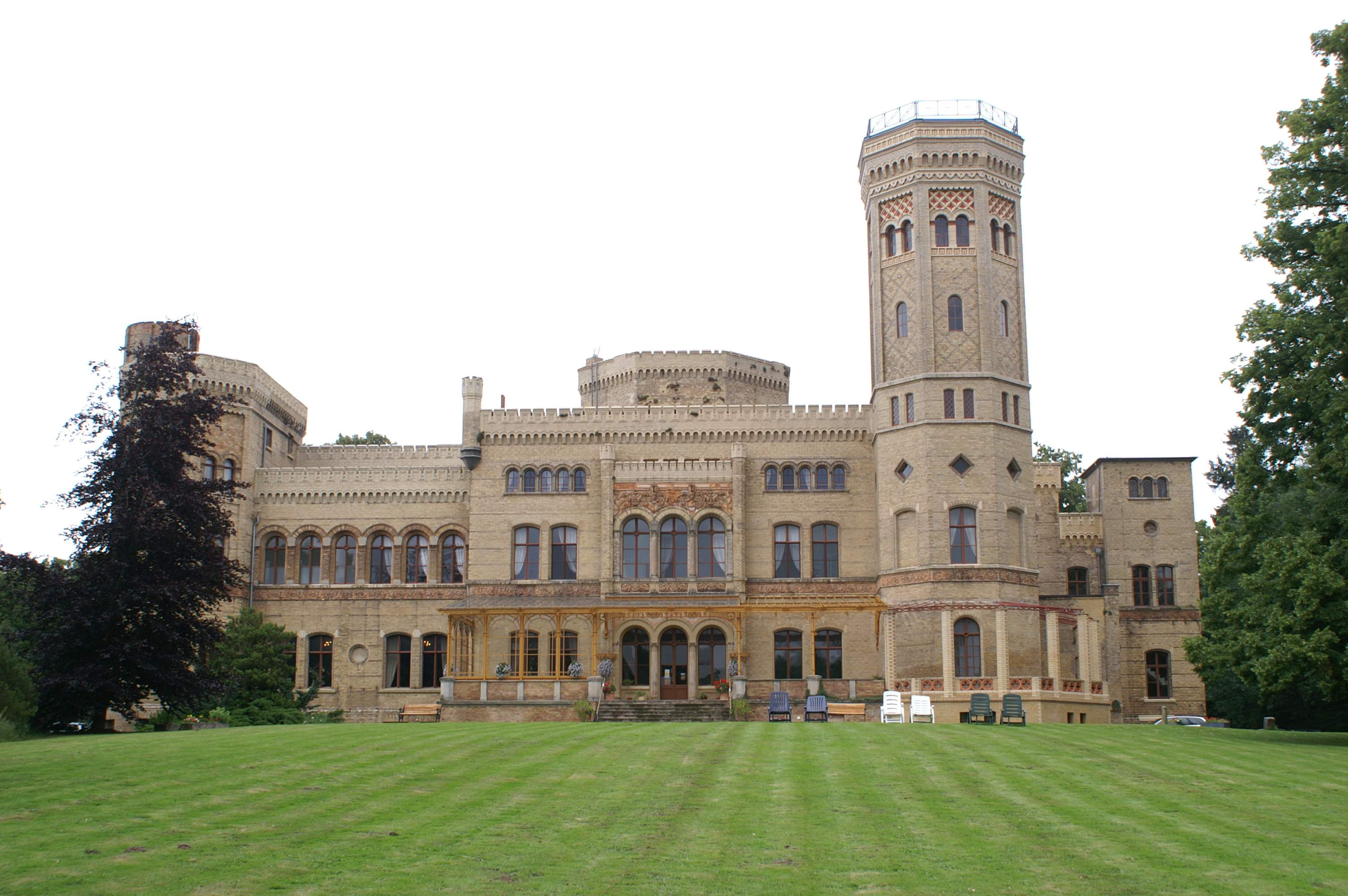 Neetzow - Landkreis Ostvorpommern - Schloss Neetzow